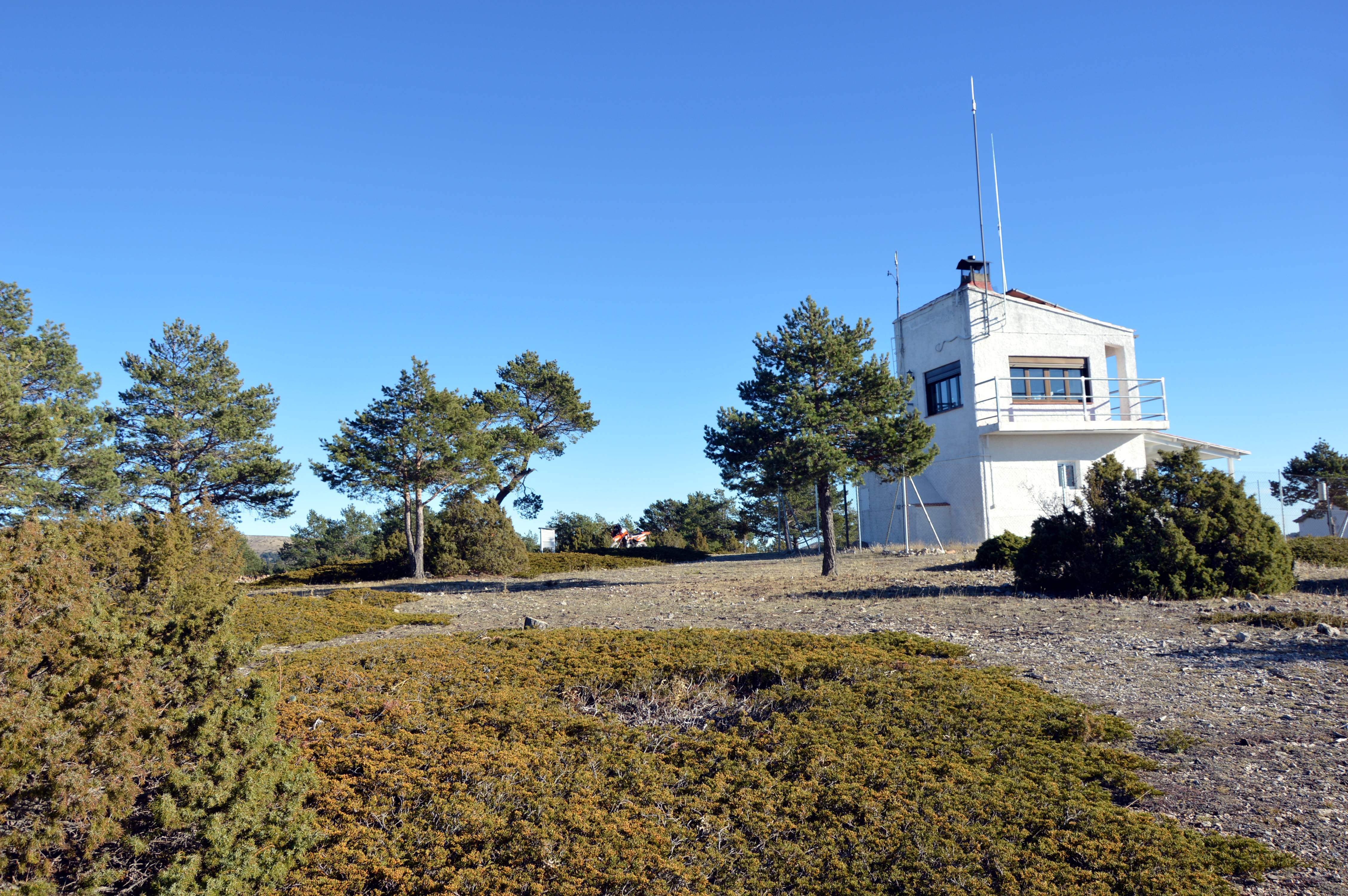 Observatorio forestal de la Generalidad Valenciana en el Pico Gavilán, Puebla de San Miguel (Valencia), 2017.